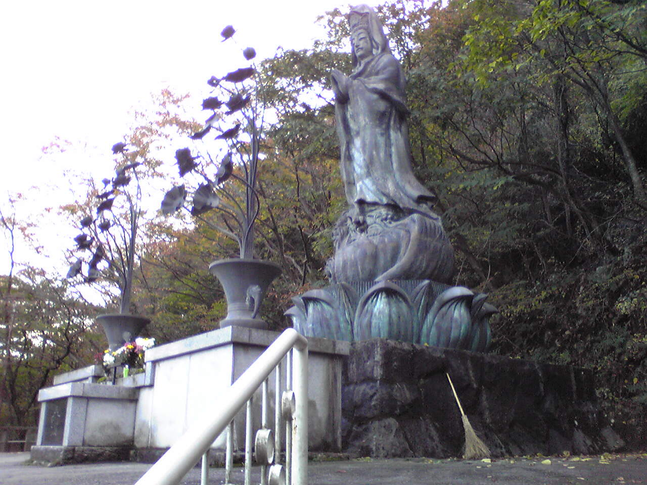 Tainai Kannon, Roadside Station, Niigata, Japan.